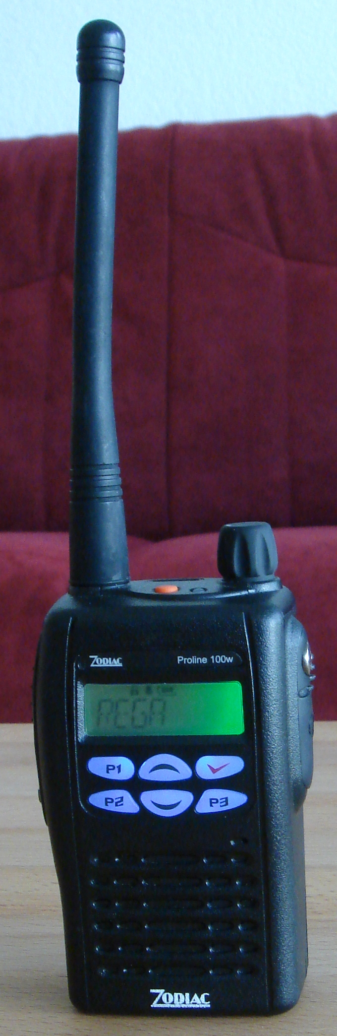 REGA-Notfunkgerät Zodiac Proline 100w (161.300 MHz)